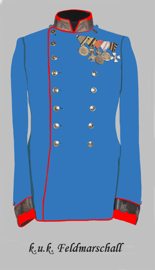 Dienst- und Paradewaffenrock eines k.u.k. Feldmarschalls